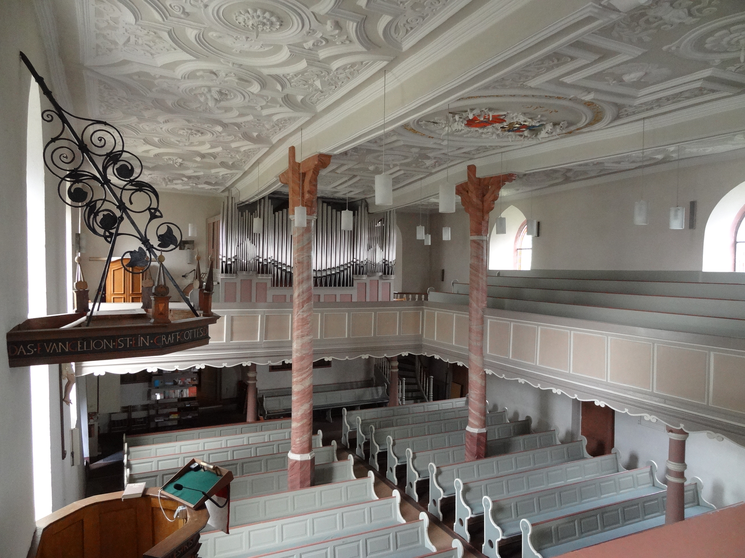 Evangelische Pfarrkirche (Nieder-Weisel)